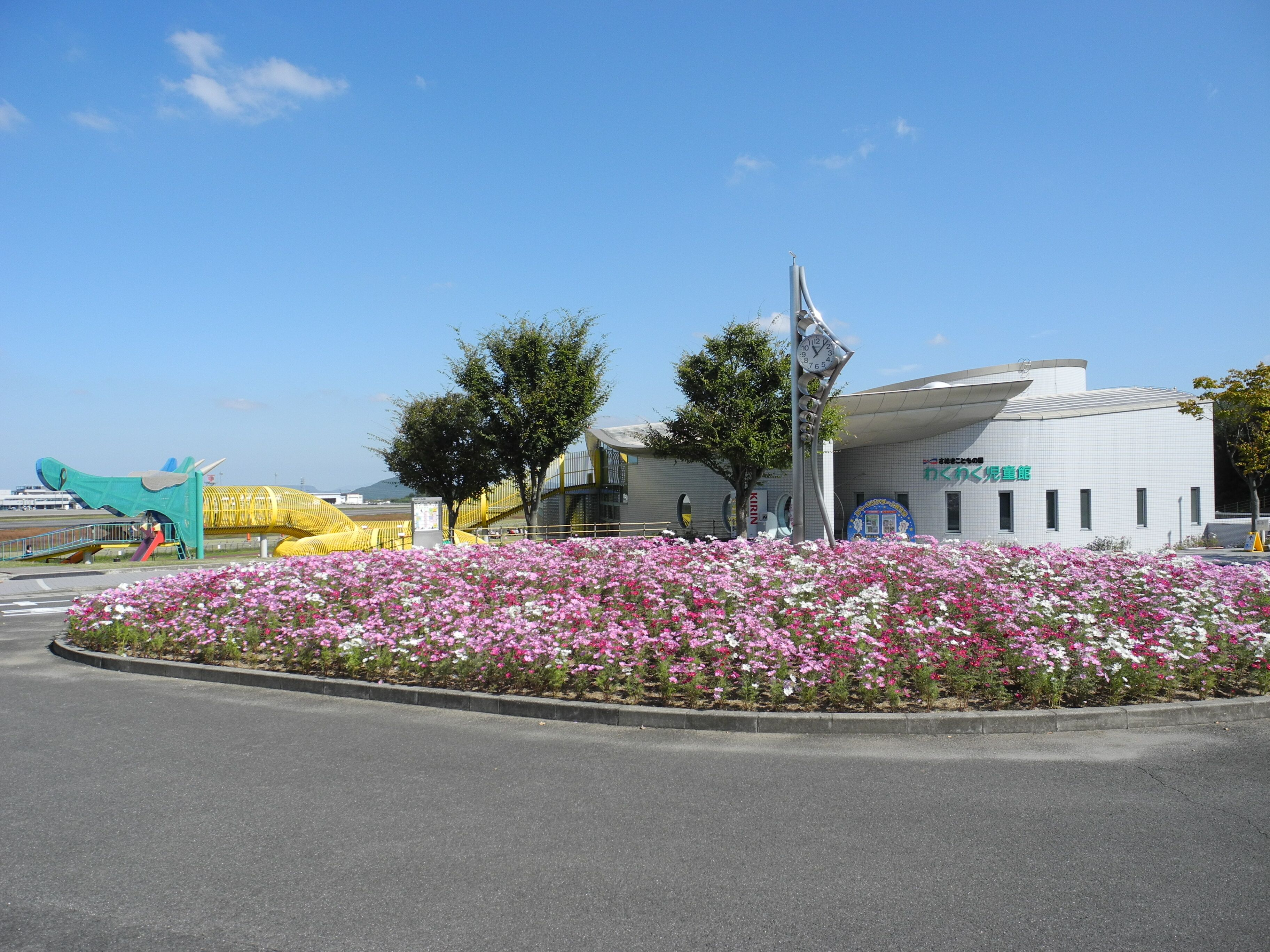 さぬきこどもの国（わくわく児童館） - 香川県高松市